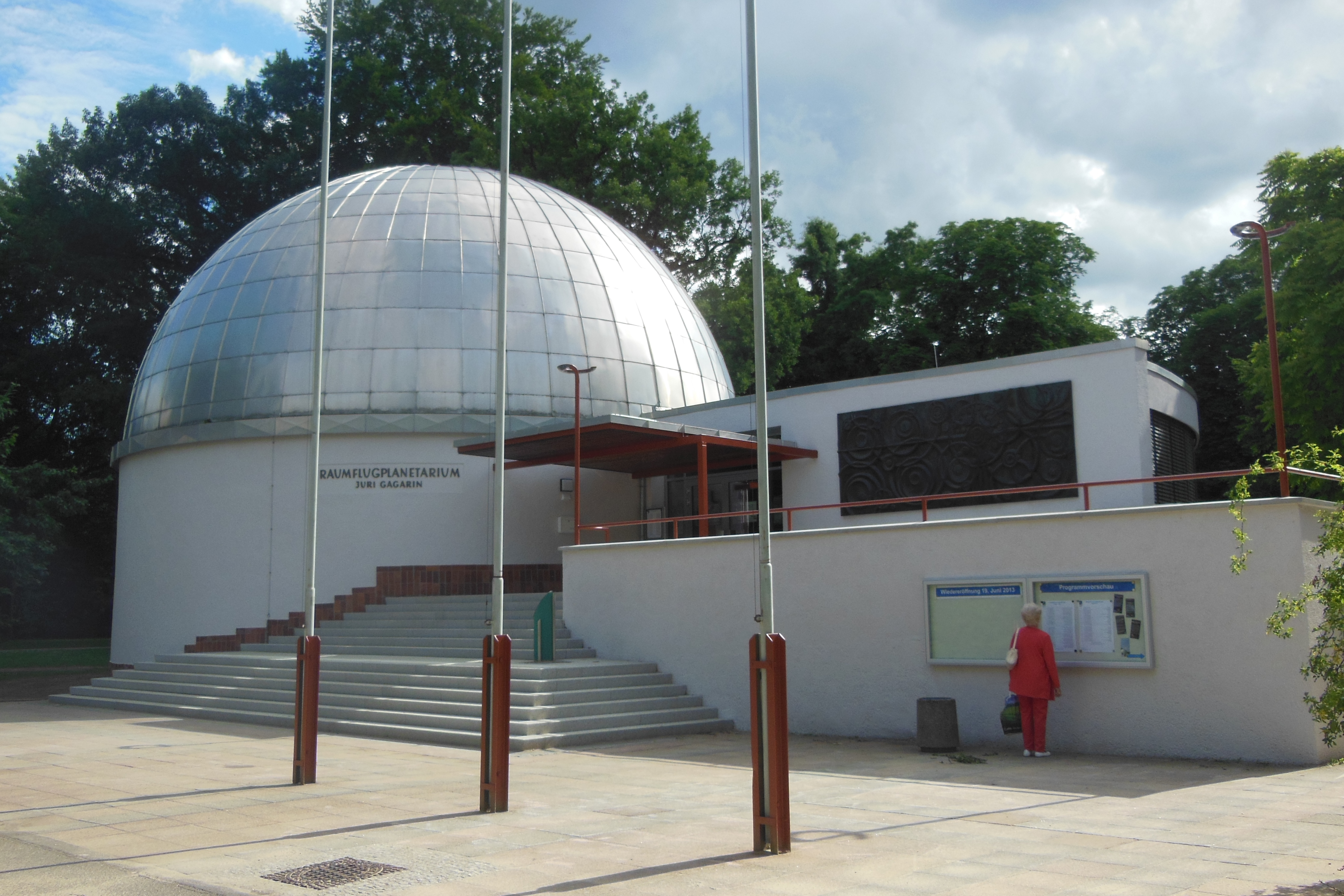 Raumflugplanetarium Juri Gagarin Cottbus; nach der Modernisierung